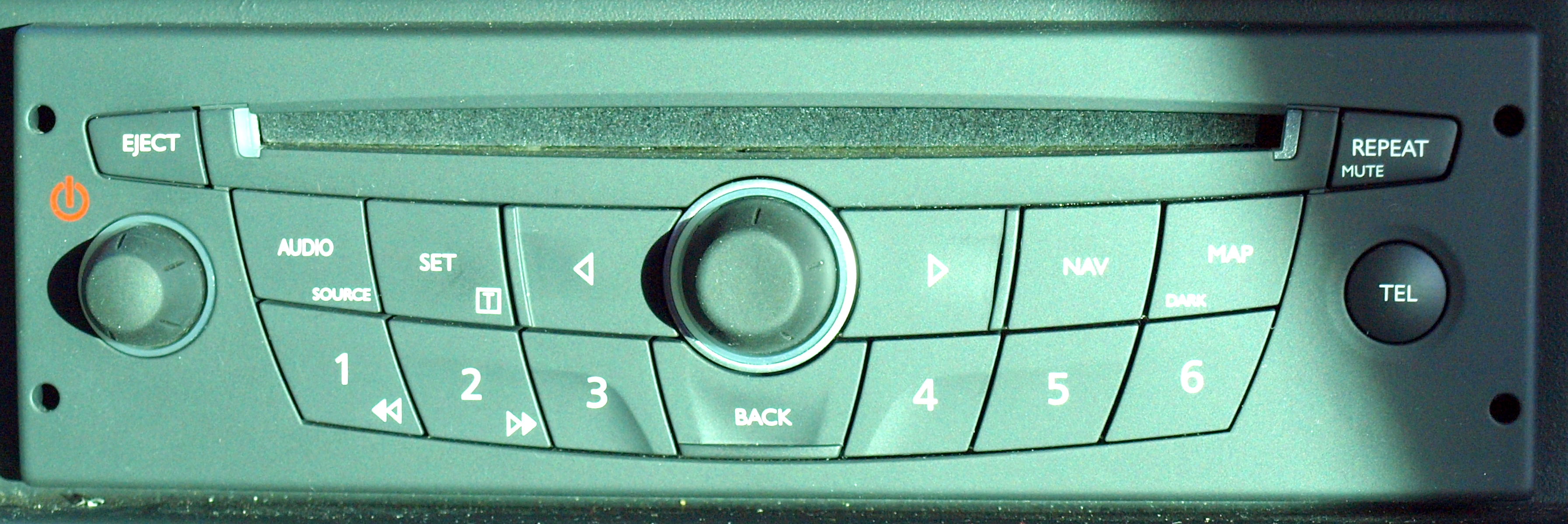 Frontansicht des CD-basierten Navigationssystems Renault Carminat 2 Bluetooth. Die Anzeige ist extern im Armaturenbrett verbaut.